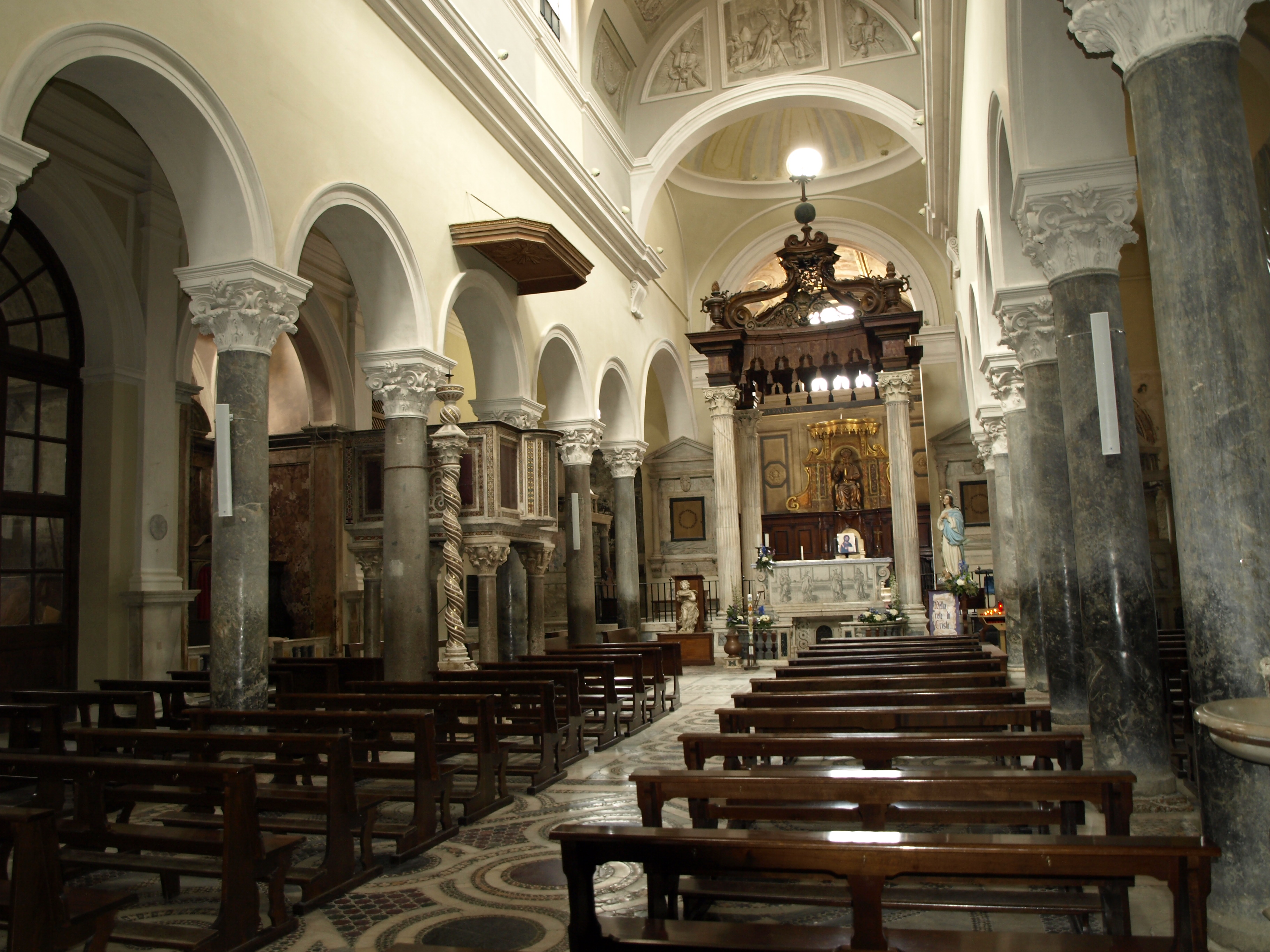 Cattedrale-interno